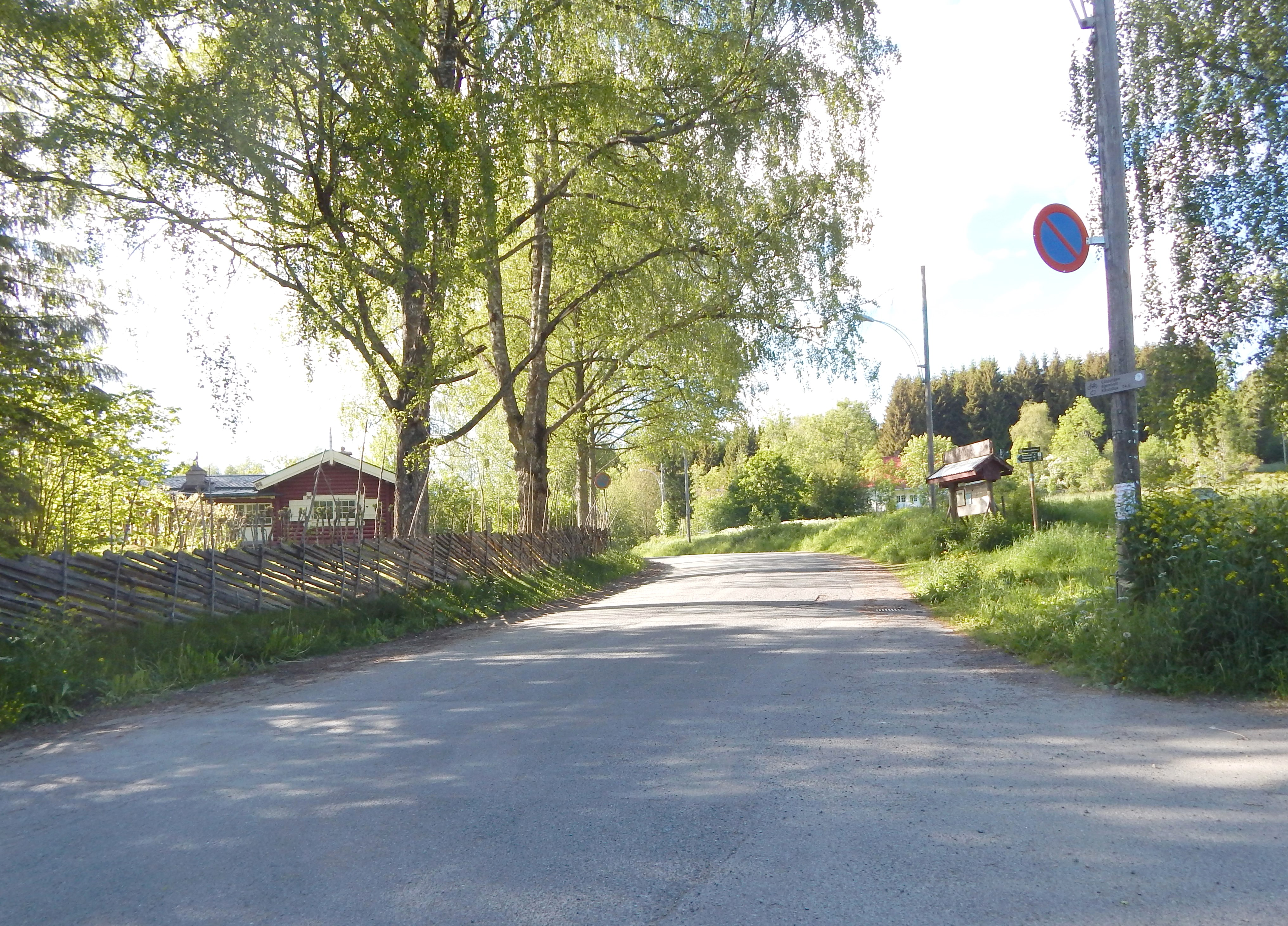 Nordmarksveien